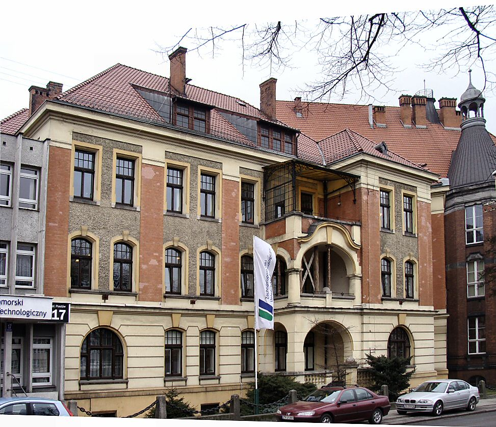 Szczecin, al. Piastów 17 - budynek, obecnie rektorat ZUT, przedogródek (zabytek nr 1284)